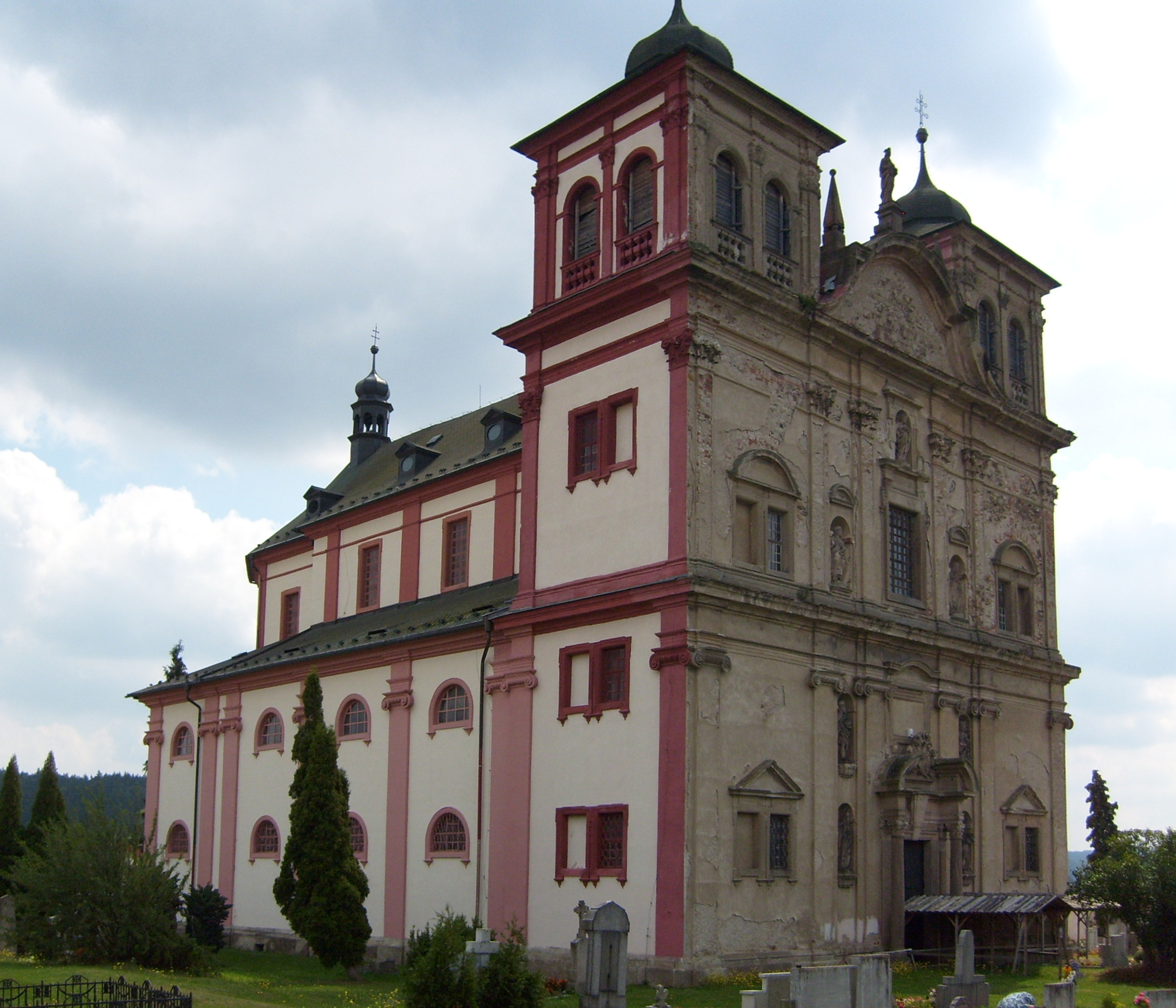 Kostel Povýšení sv. Kříže, Chyše, Karlovy Vary Region, Czech Republic